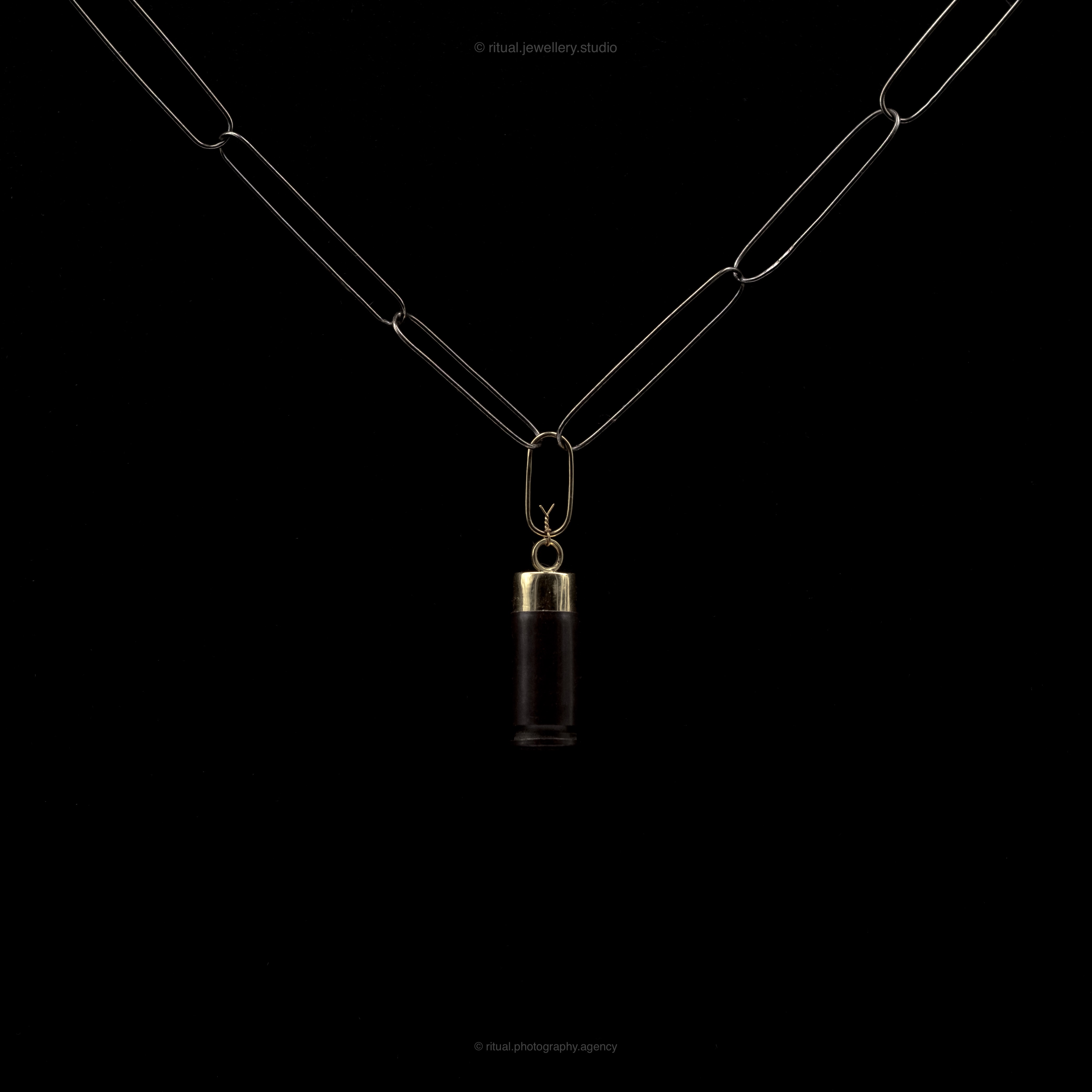 Si vis pacem... Necklace 2019 Oxidized Sterling Silver 14K Gold Pendant: Time capsule Parent case "Parabellum" Brass and 14K Gold Sven Tali